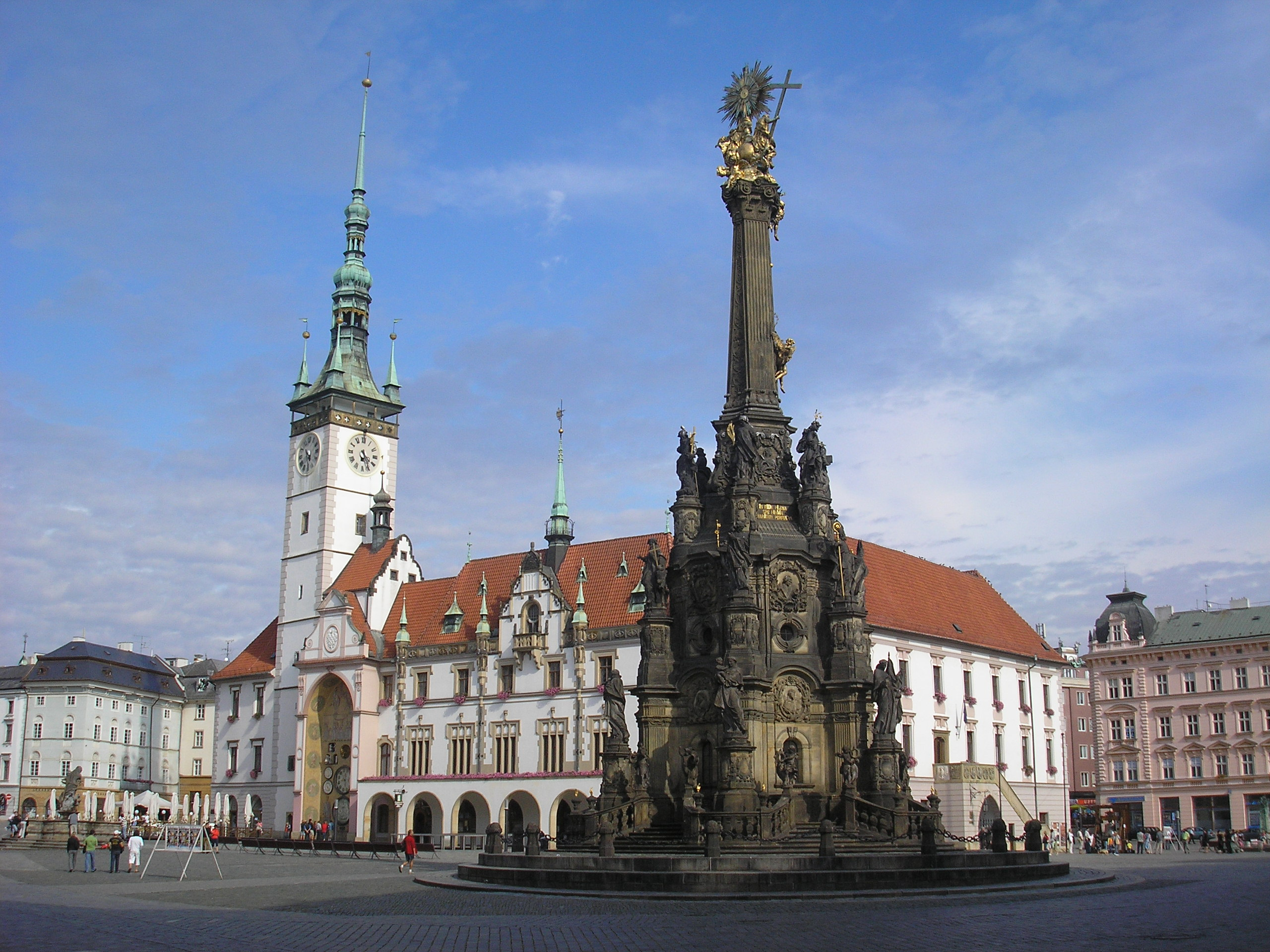 Hauptplatz in Olmütz